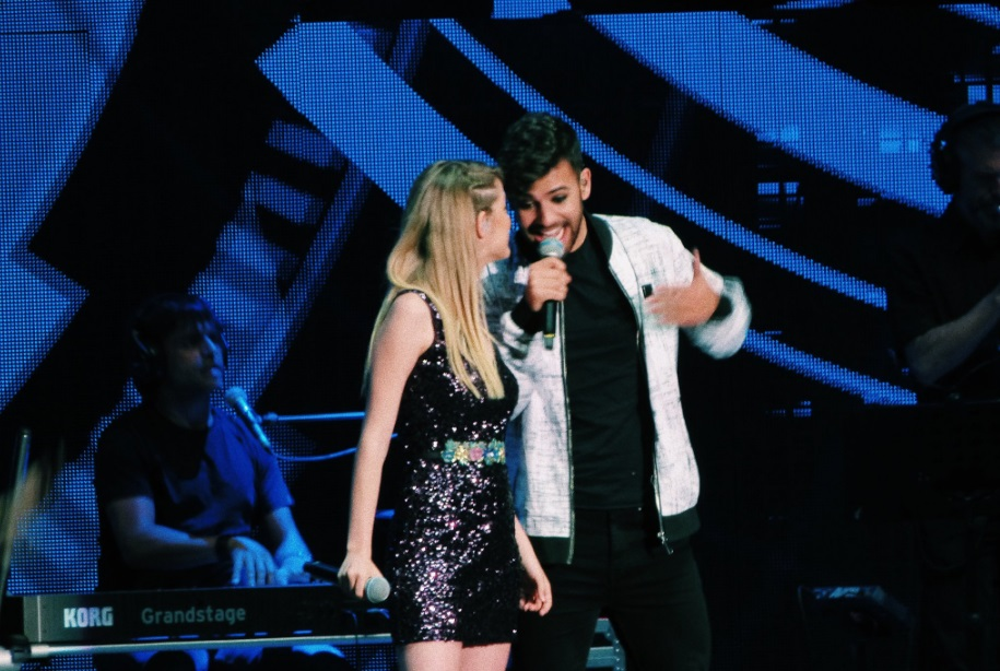 Agoney Hernandez Nerea Rodriguez Symphony Pamplona